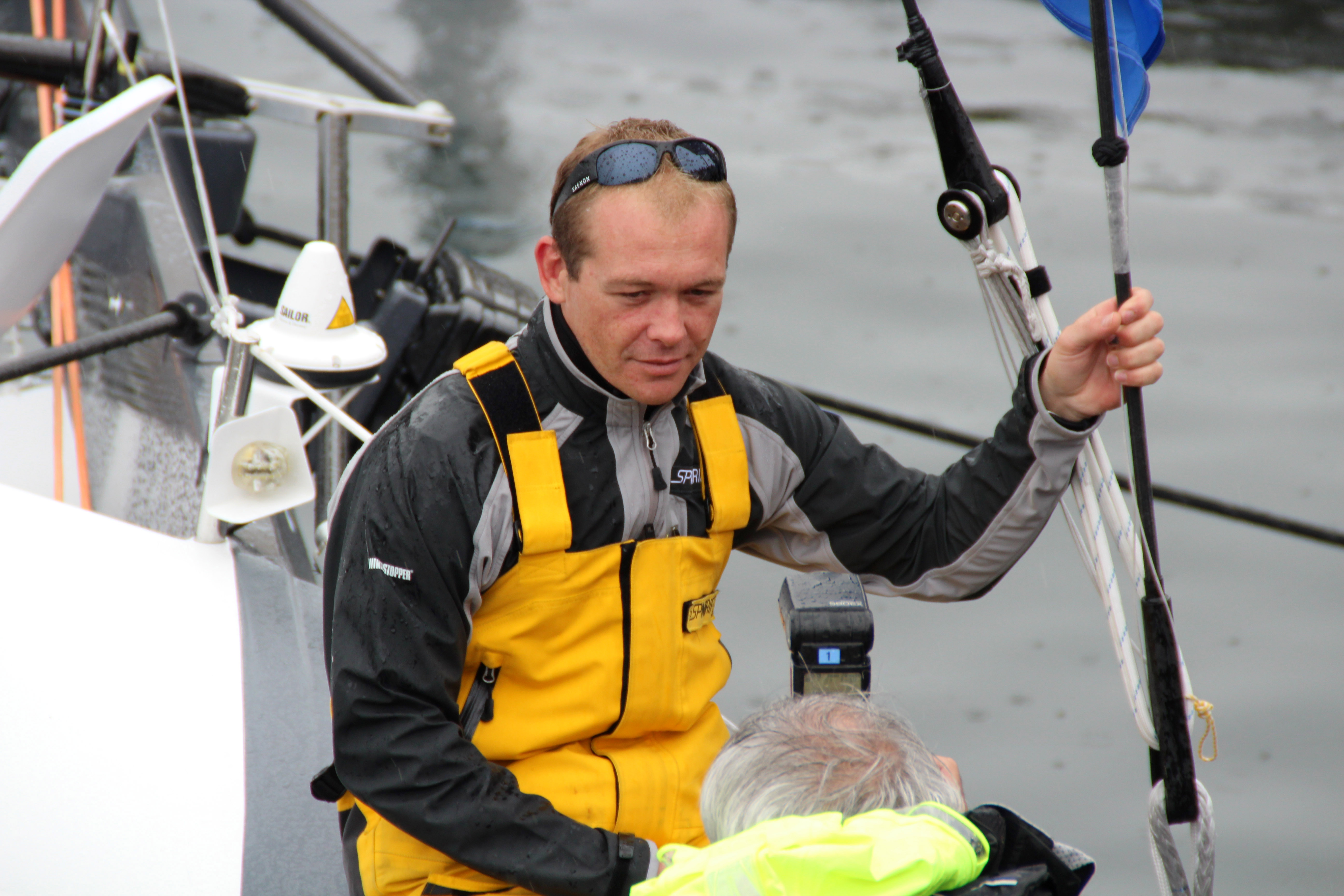 Tonnerres de brest 2012 Krys Ocean Race